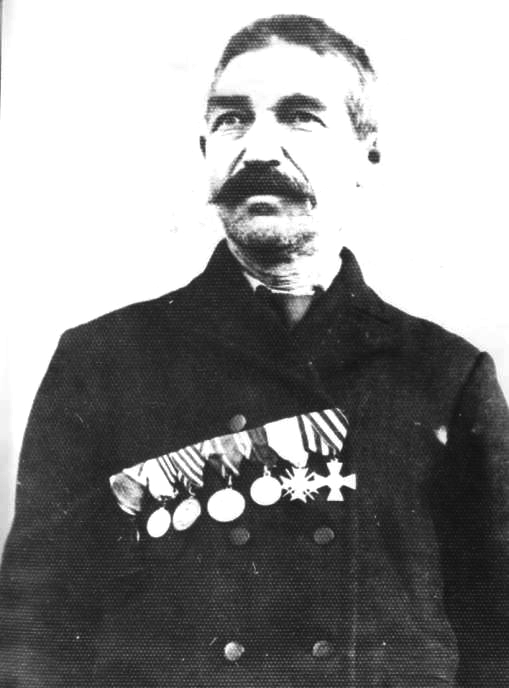 Иван Владиков - Владиката